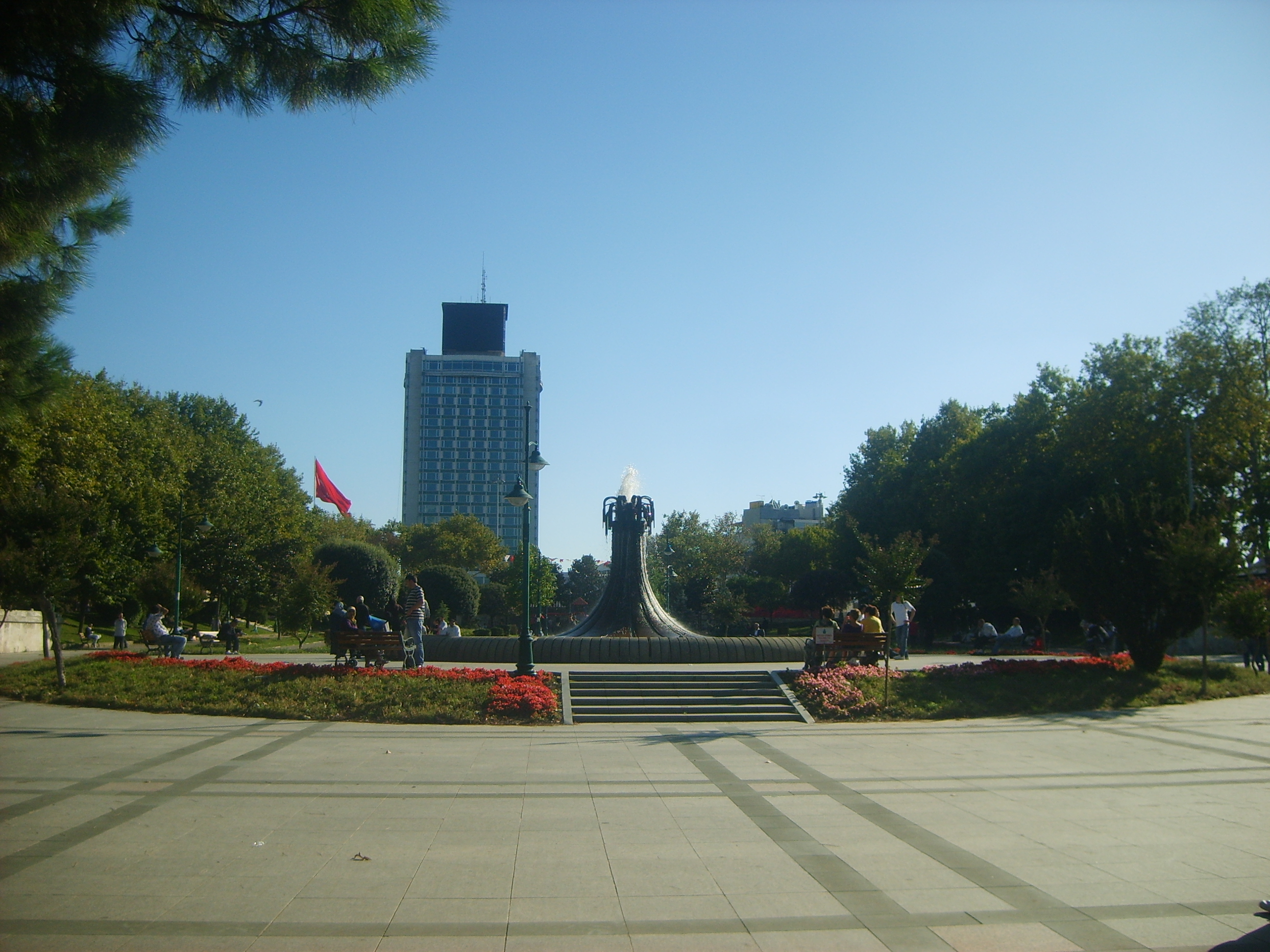 İstanbul, raylı sistemler taksim gezi parkı